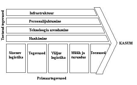 Tegevuste jaotus Porteri järgi